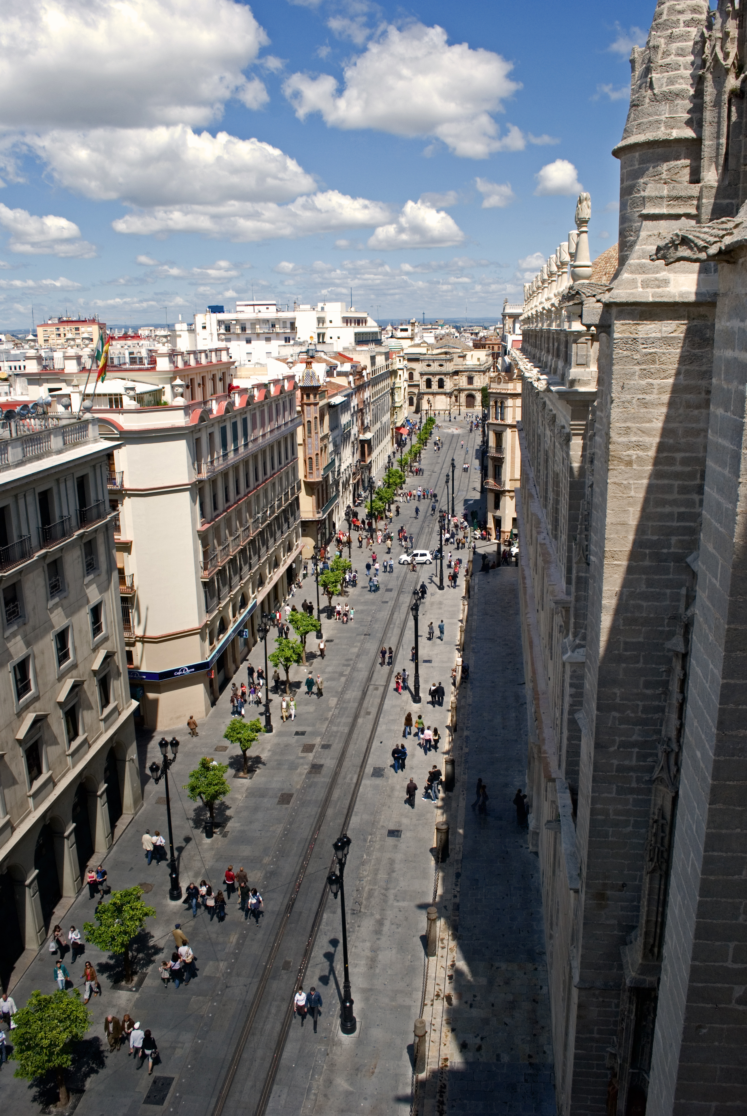 Vista de la Avenida de la Constitución desde la Catedral (Sevilla)